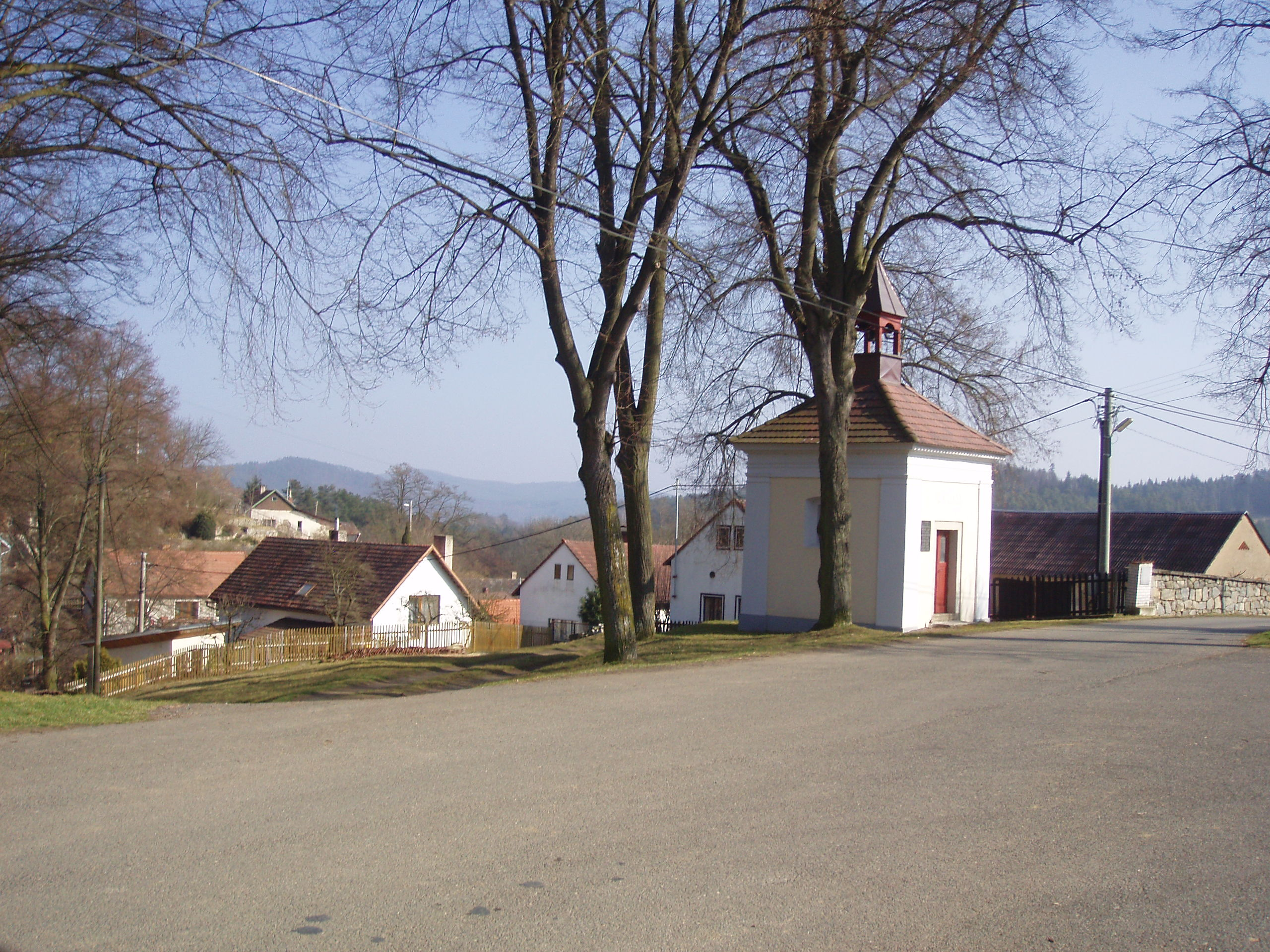 Hubenov,malá obec u Nečíně